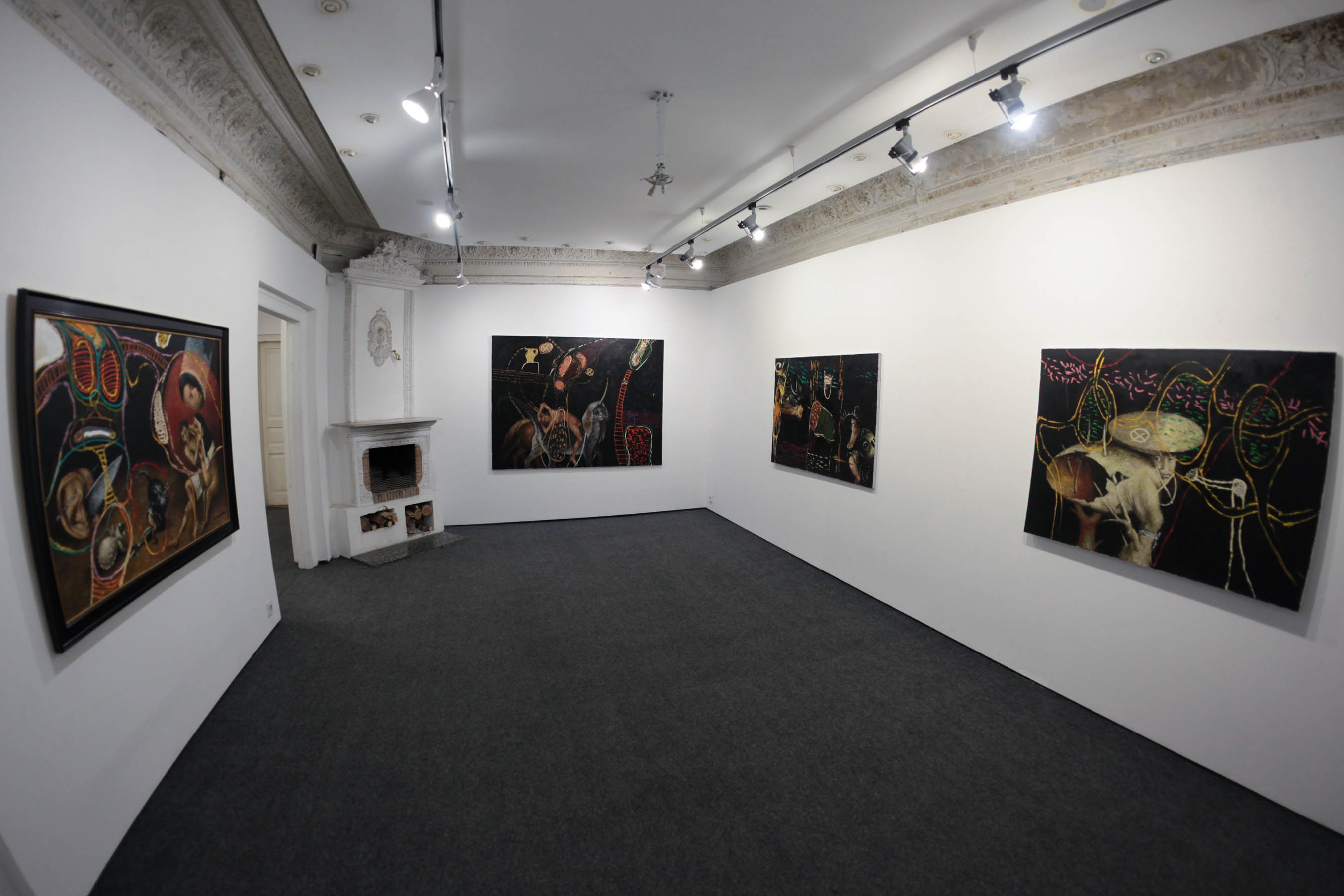 Карась Галерея. Олександр Ройтбурд "Сад земних насолод". 2016